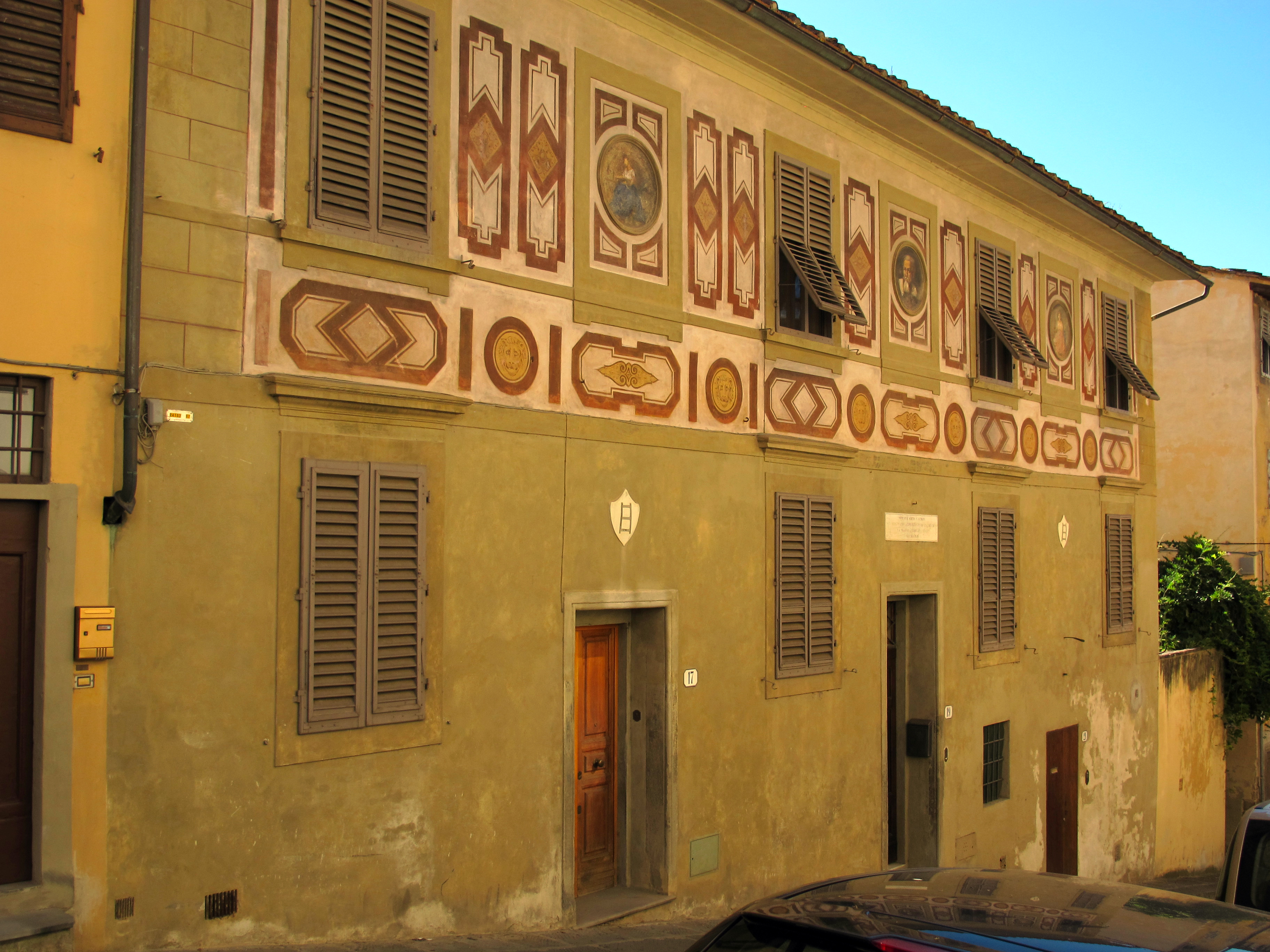 Costa San Giorgio, Firenze